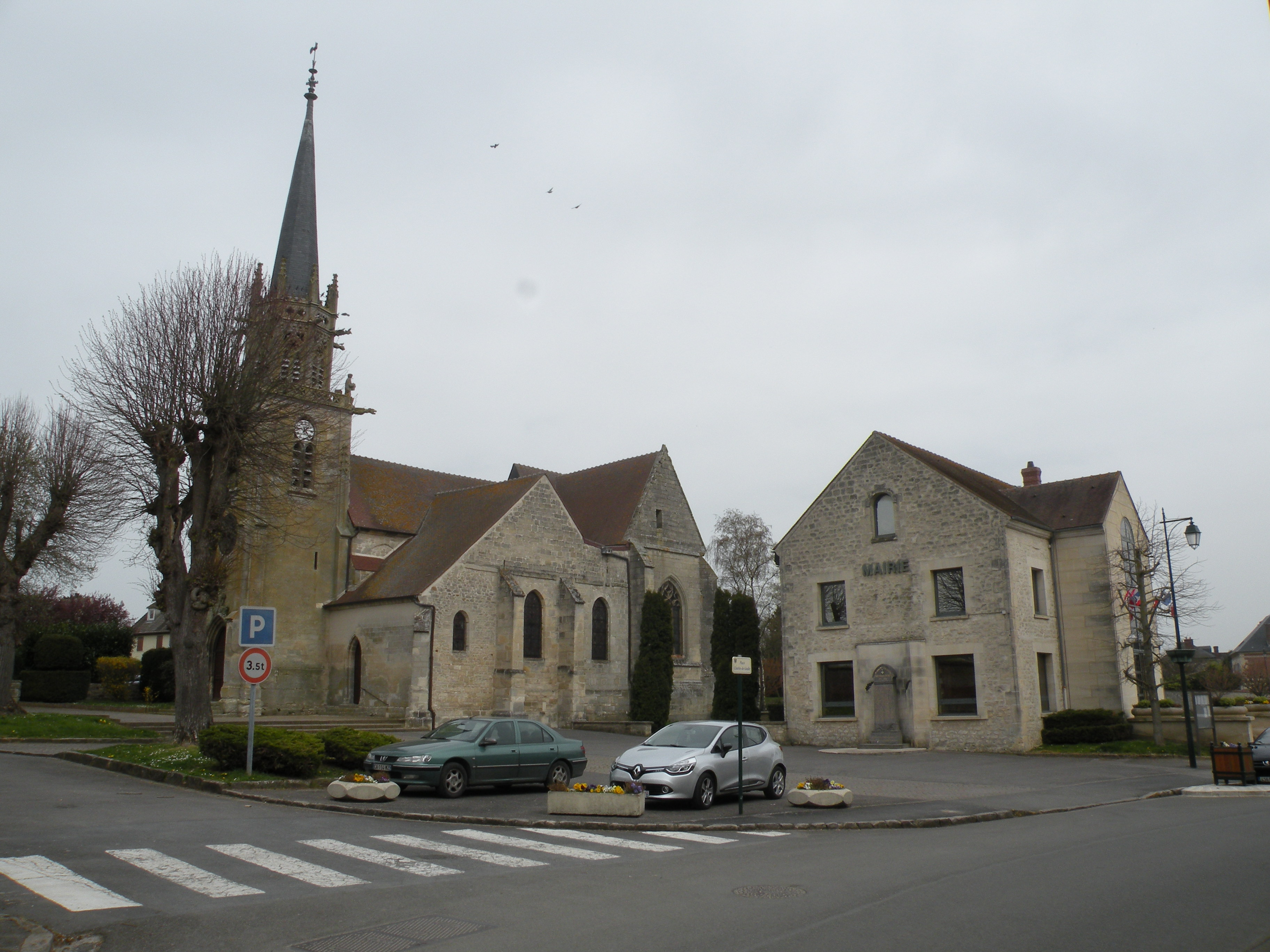 mairie Ercuis